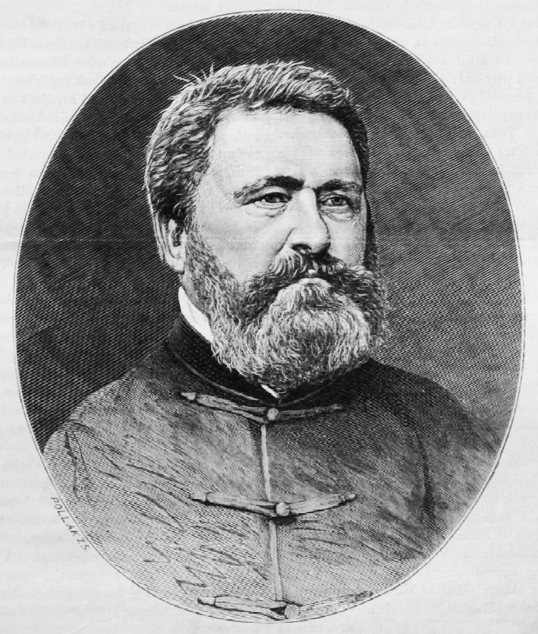 Révész Imre (1826–1881) református lelkész, egyháztörténész, a Magyar Tudományos Akadémia levelező tagja portréja. Pollák Zsigmond metszete